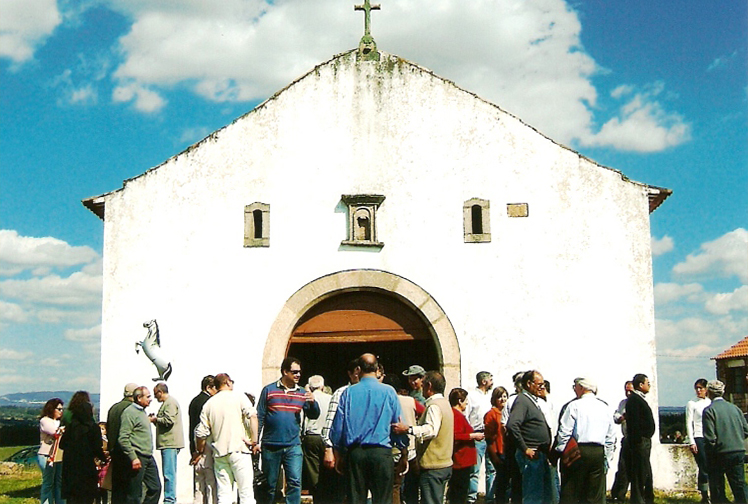 Ermida de N.S.da Granja, em dia de Romaria de 2ª-feira de Páscoa